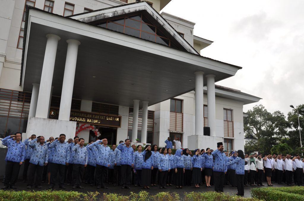 Para pegawai dan anggota Dewan Perwakilan Rakyat Daerah Provinsi Maluku sedang menghormati bendera saat upacara peringatan Hari Kemerdekaan Republik Indonesia Ke-74.